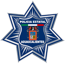 Escudo de la Policía Estatal de Aguascalientes, México.